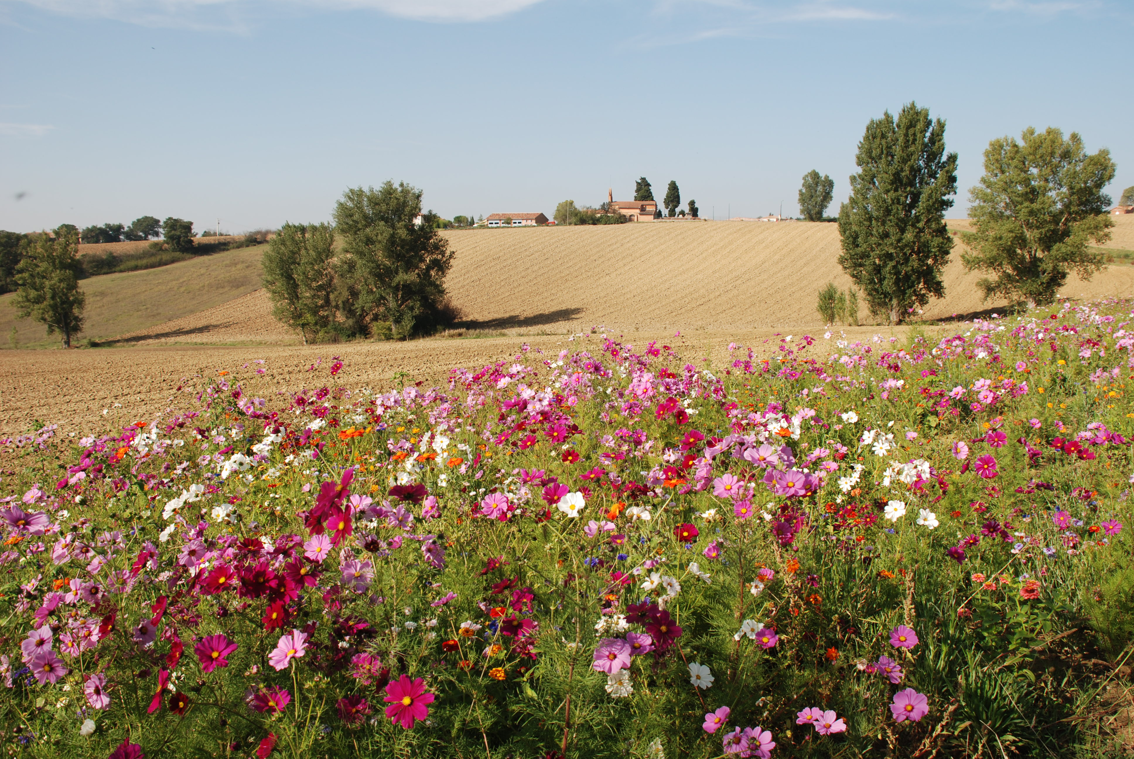 Jachère fleurie sur la commune de Mervilla (Haute-Garonne, Midi-Pyrénées, France).